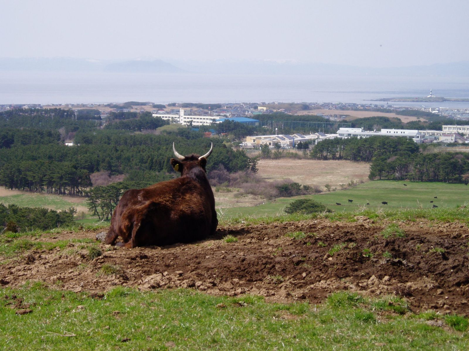 シーサイドキャトルパーク大間（町営観光牧場）にて。展望台から、大間の町、津軽海峡、北海道が良く見えます。